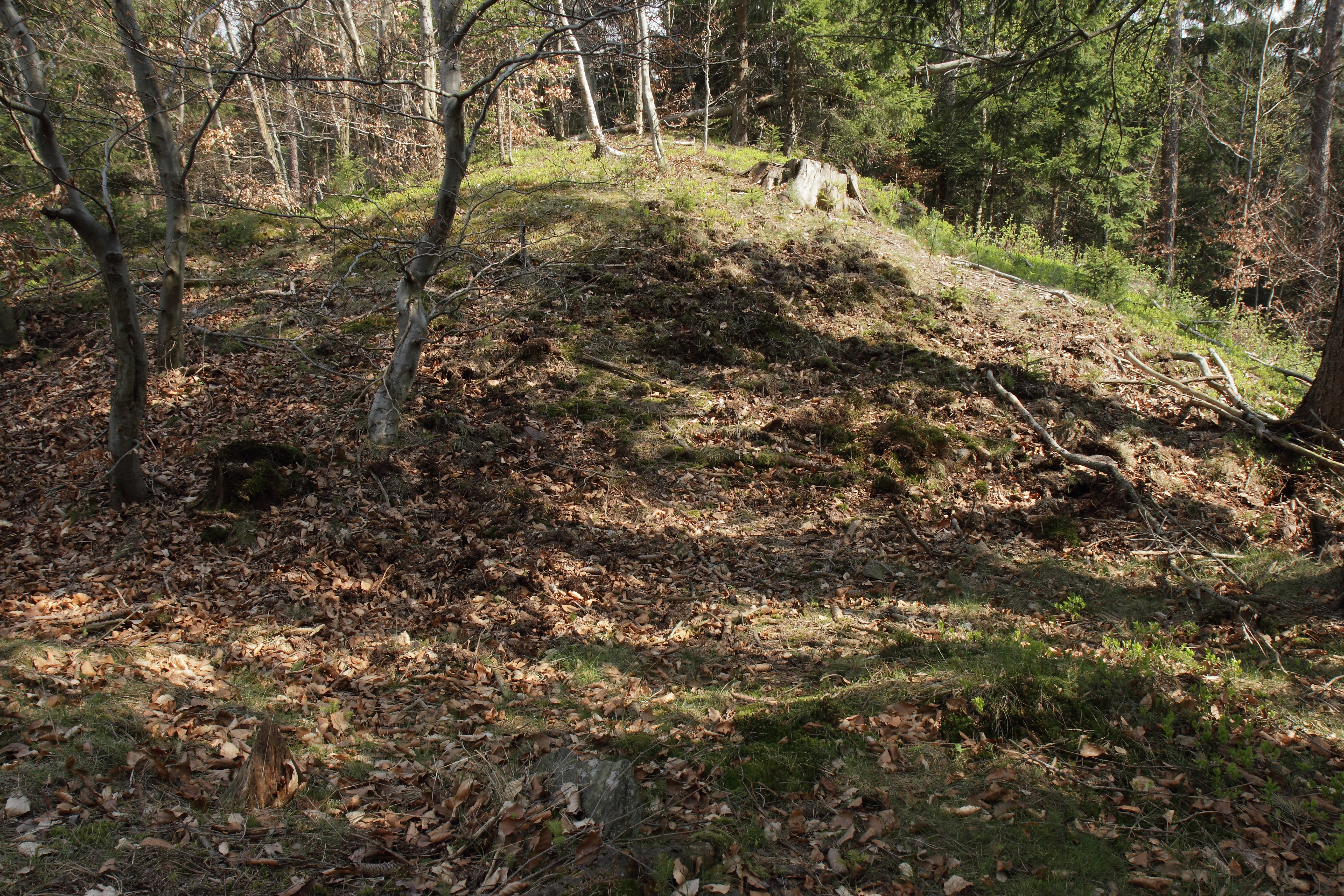 Burgstall Lichteburg - Ansicht der Burgstelle über den Halsgraben